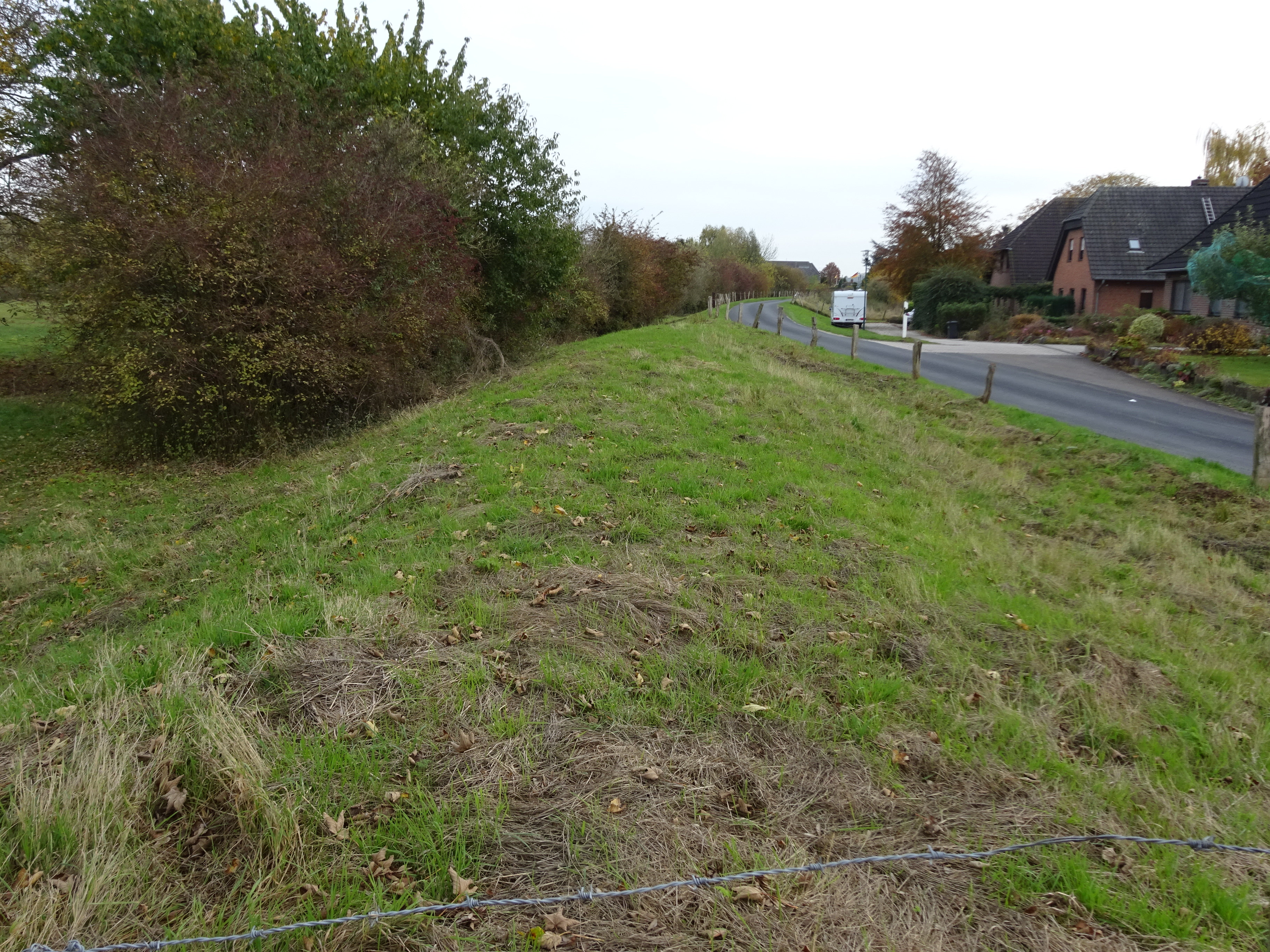 Kalkar-Wissel, Michelsdick aan de T-kruising met de Dorfstraße